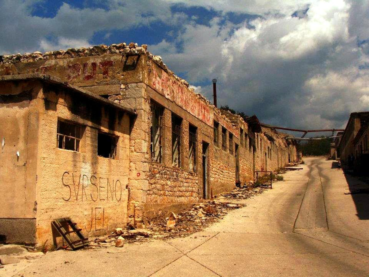 Old prison - Goli Otok